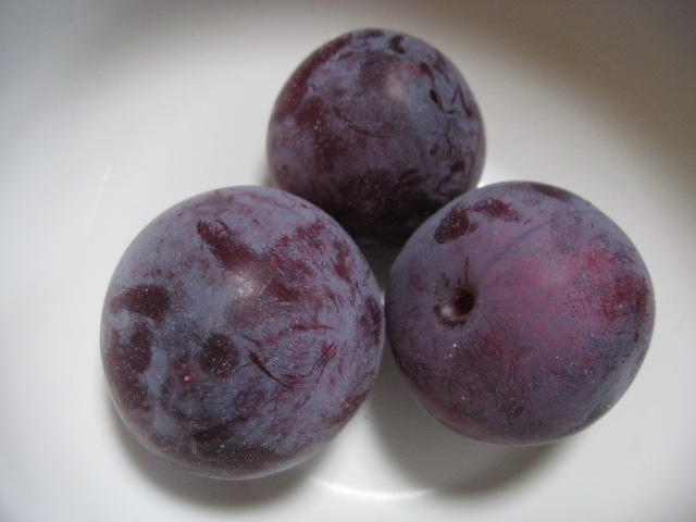 Soldum is a cultivated variety of japanese plum.